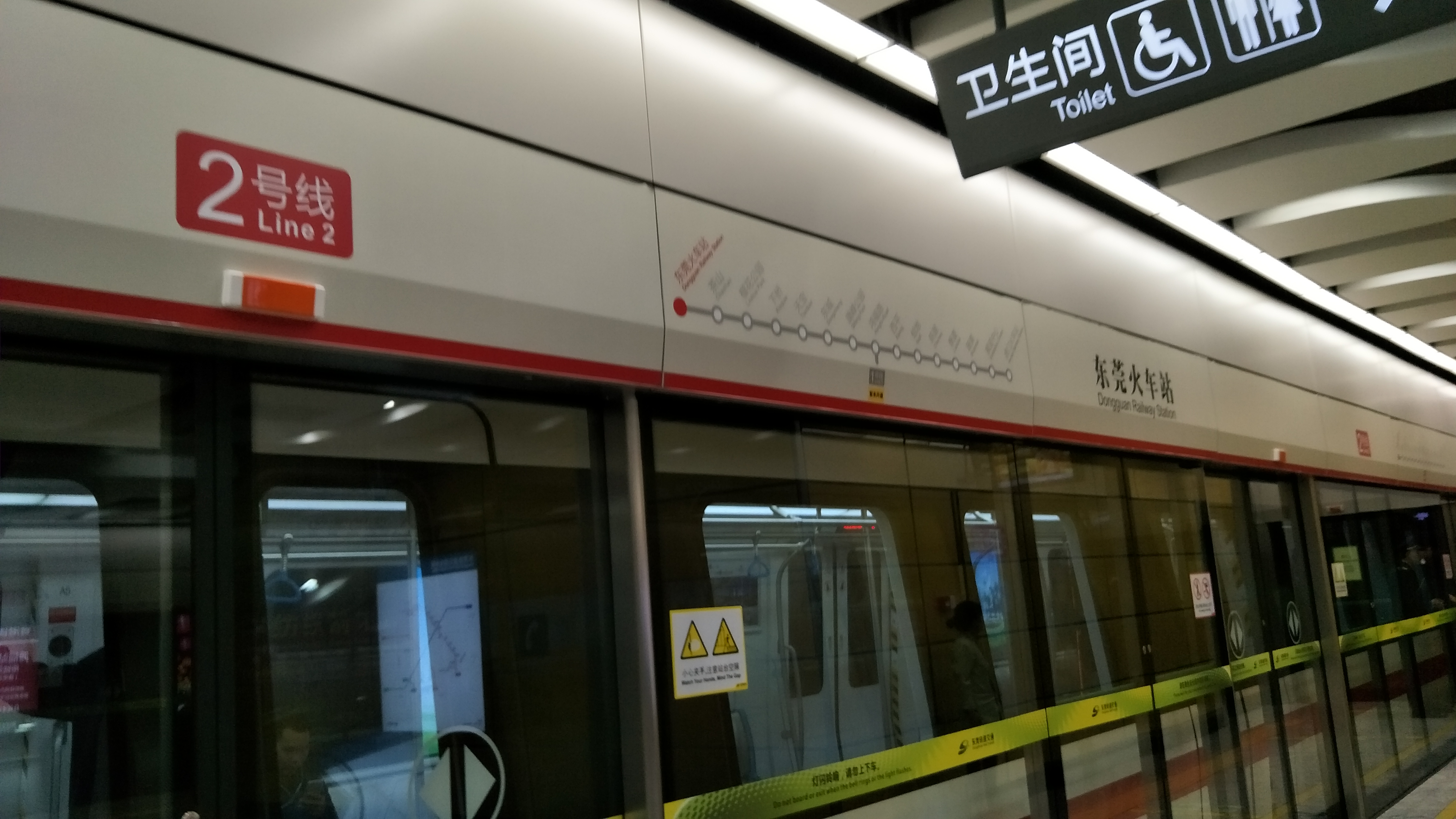 地铁东莞火车站月台